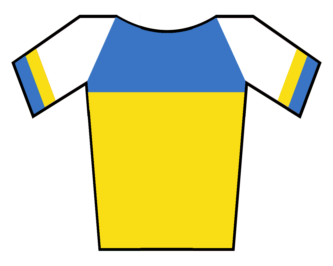 Maillot de Ucrania